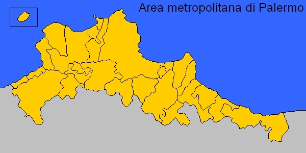 sono l'autore rilascio tutti i diritti